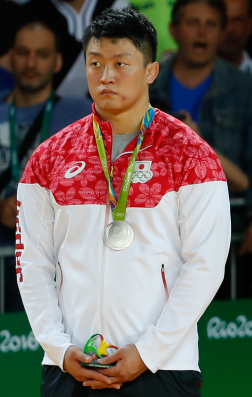 Rio de Janeiro - Judoca Rafael Silva, o Baby ganha medalha de bronze nos Jogos Olímpicos Rio 2016